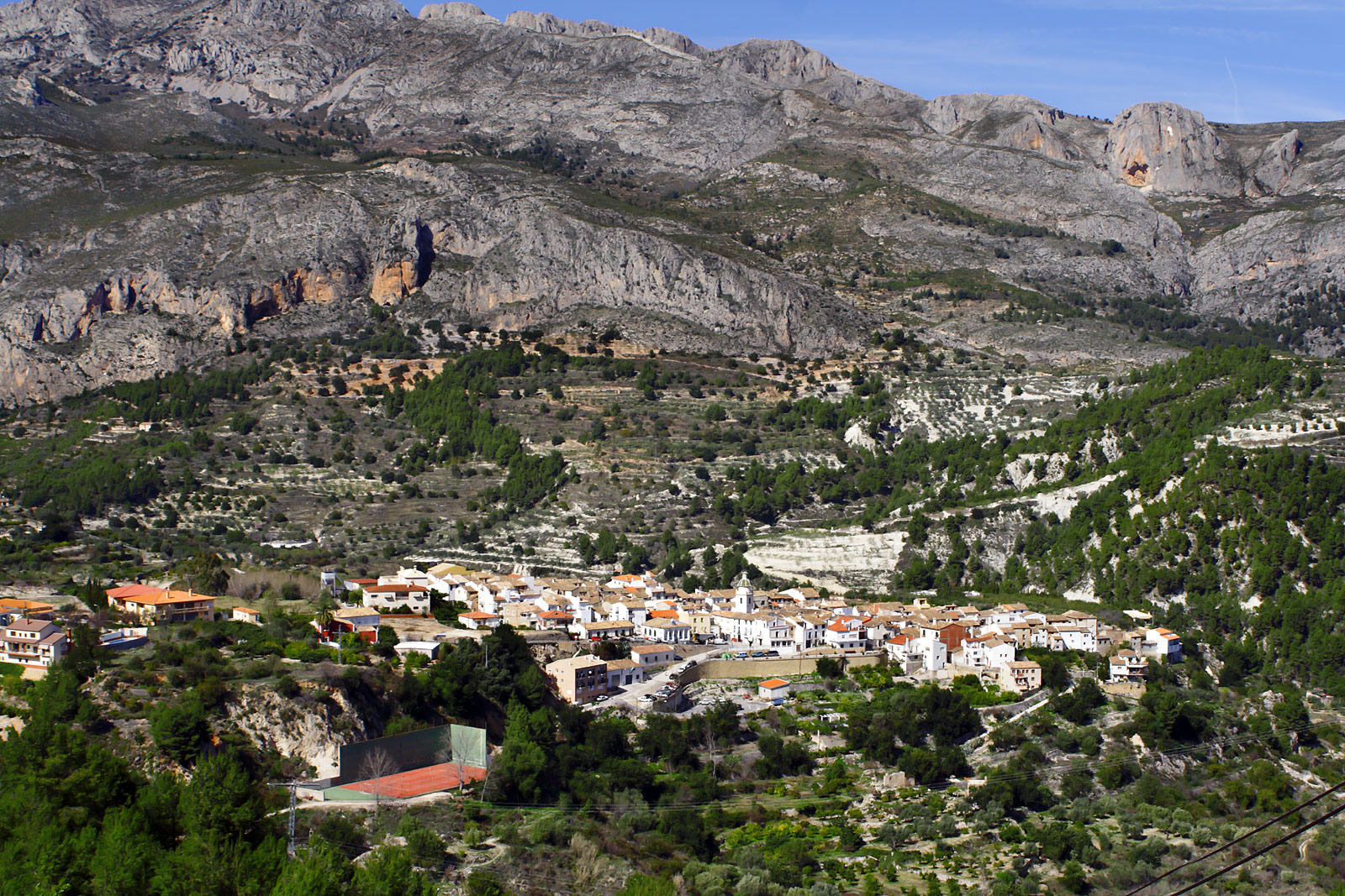 Vista de Beniardà, en la Comunidad Valenciana, Alicante, Espana.